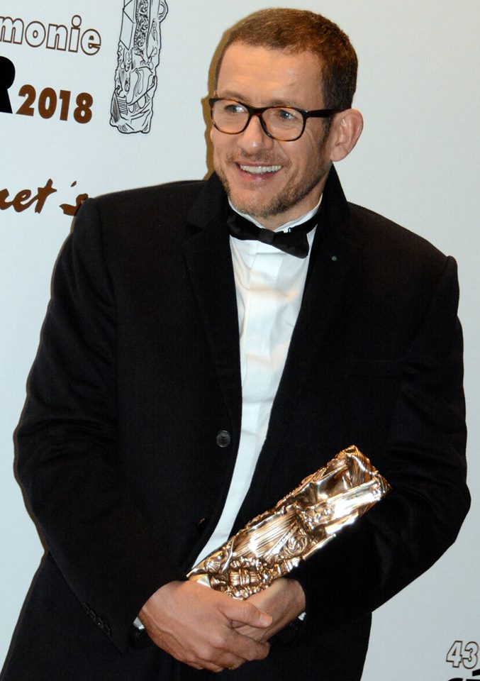 Dany Boon à la cérémonie des César du cinéma